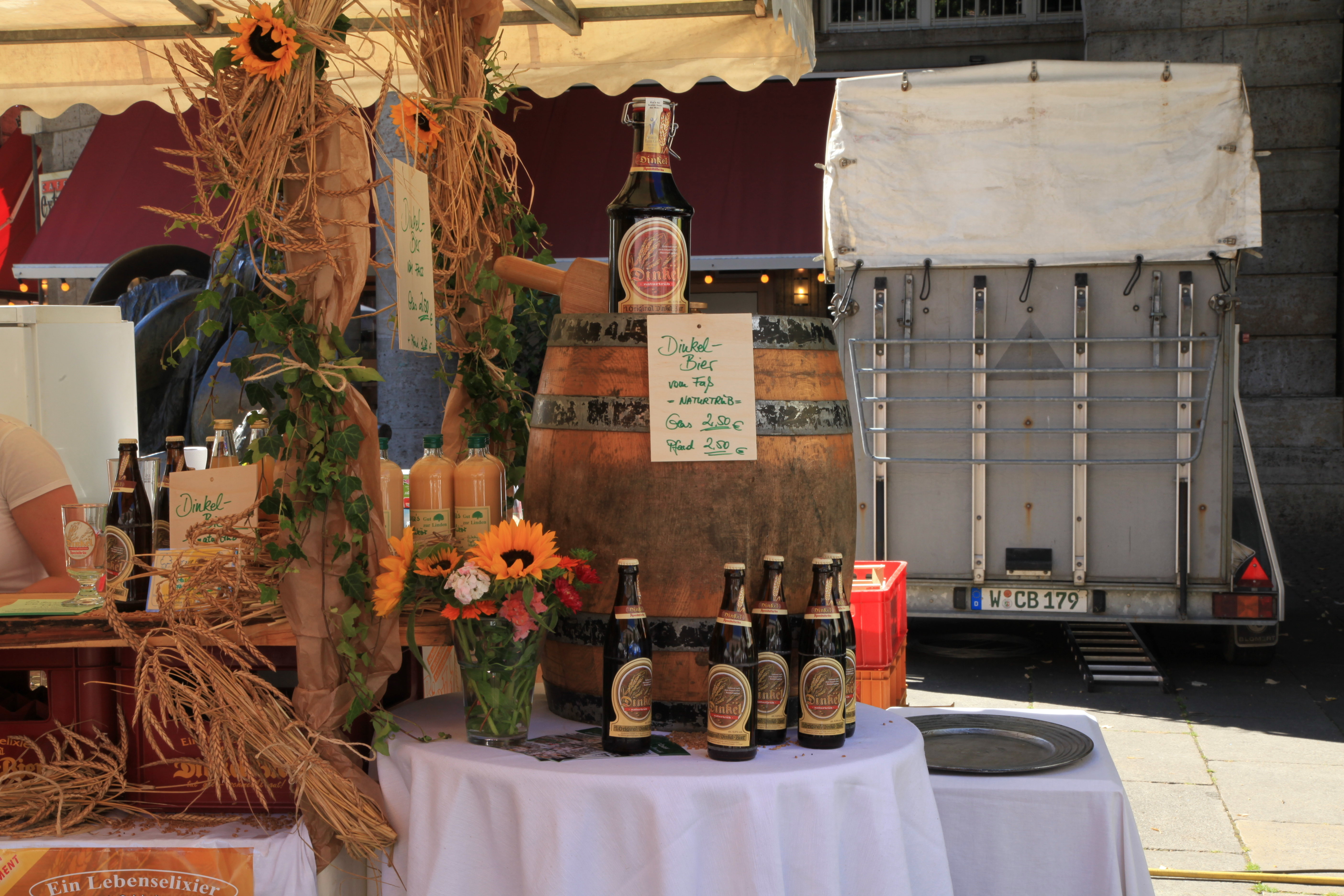 Wuppertaler Bauernmarkt 2012 auf dem Johannes-Rau-Platz in Wuppertal